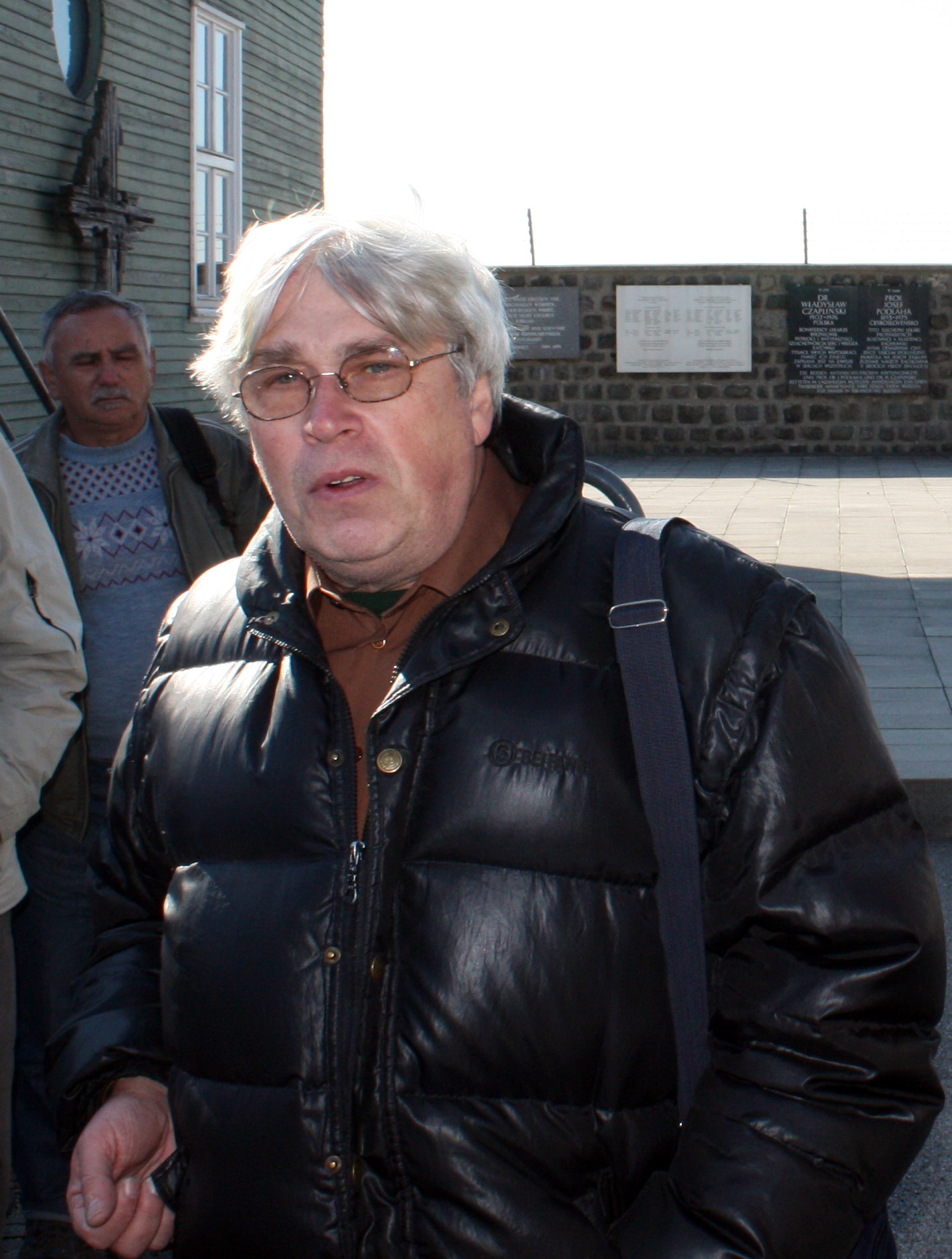 Jaroslav Čvančara jako průvodce při prohlídce KT Mauthausen v říjnu 2011.